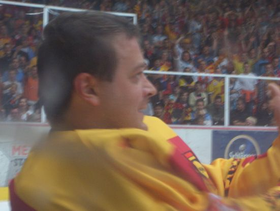 Andrej Trefilow beim Abschiedsspiel an der Brehmstraße